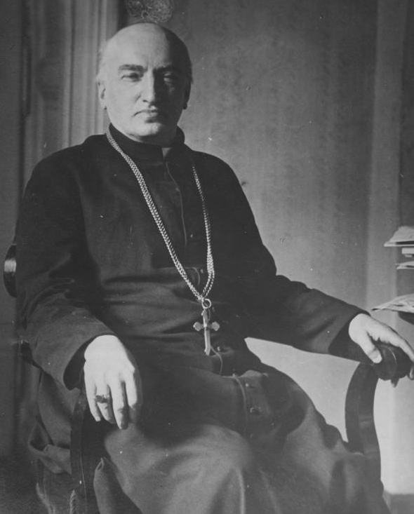 Arcybiskup metropolita lwowski obrządku ormiańskiego Józef Teodorowicz.